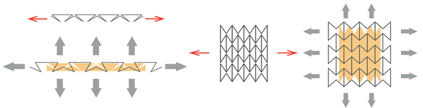 sie zeigt einerseits die Querausdehnung in der Höhe und andererseits die Querausdehnung in der Fläche bzw. Breite